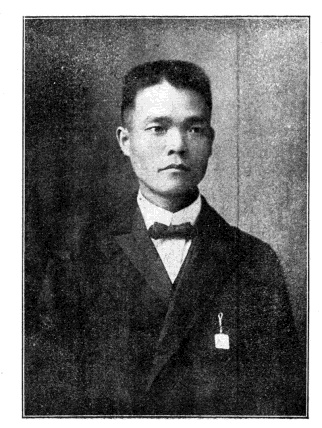 中文（台灣）: 中華民國國會議員